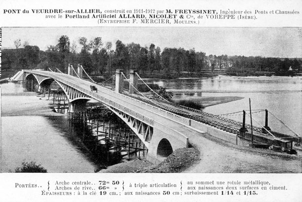 Les deux ponts de Veurdre juste après 1912. Le nouveau pont en béton construit par Freyssinet et l'ancien pont suspendu avec sa destruction